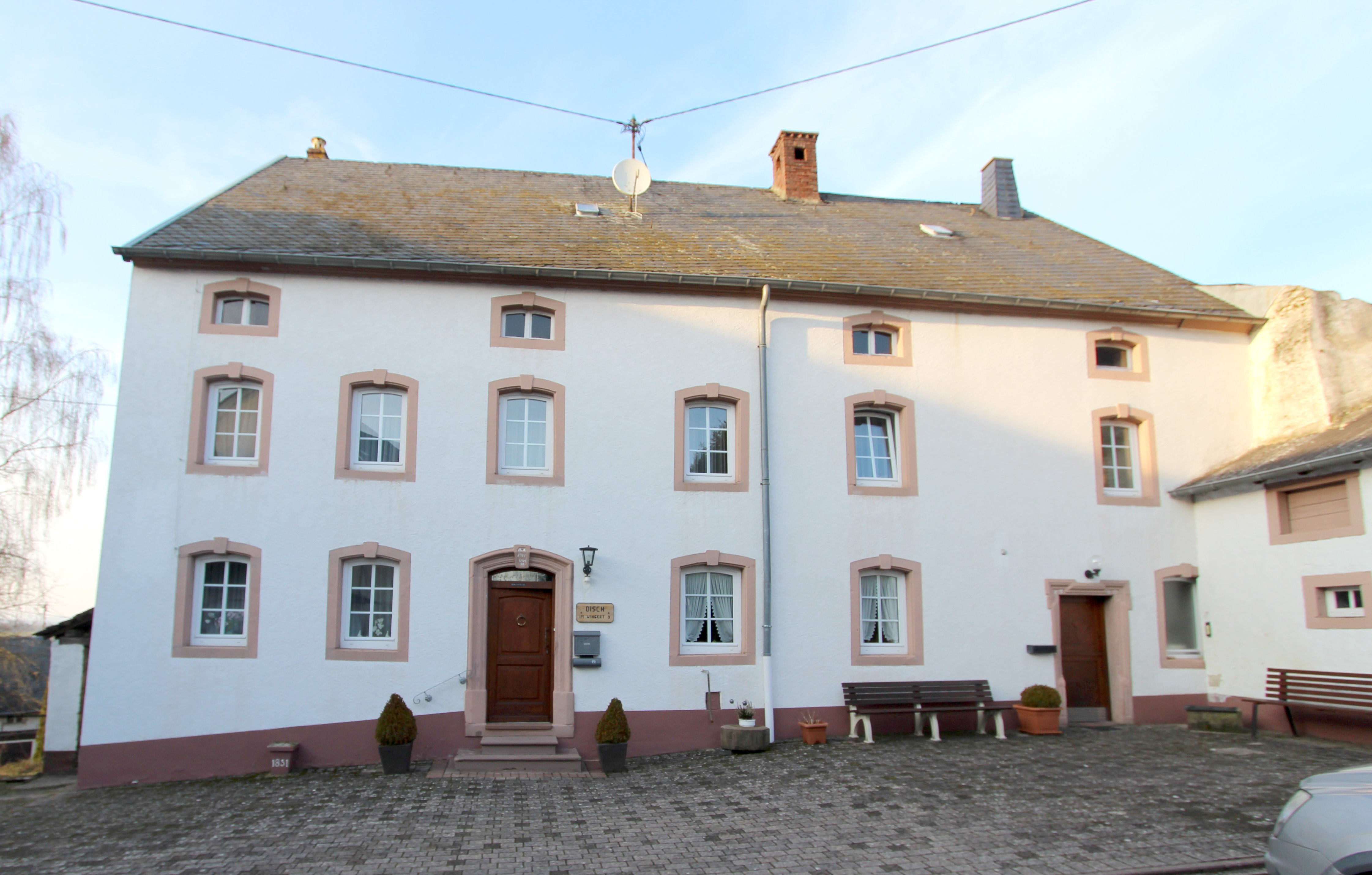 54634 Bitburg-Masholder, Im Wingert 9. Das großbäuerliche Streugehöft gruppiert sich um einen Hof, der nach Norden zum traufständigen Wohnhaus hin abfällt. Der stattliche, von Segmentbogenfenstern in 7 Achsen gegliederte Bau ist bis in die Details der Fassadengestaltung unverändert erhalten. Auf jedes zweite Fenster entfällt eine Drempelluke. Das geohrte und profilierte Gewände der Tür zum ehemaligen Backhaus mit Futterküche trägt die Jahreszahl 1740. Das Portal zum Wohnteil mit Segmentbogensturz und ehemaligen Oberlicht ist auf 1785 datiert. Das Türblatt dürfte zwei Generationen jünger sein. Die beiden Hausachsen sind Unterkellert. In der geräumigen Küche haben sich ein großer Spülstein aus rotem Sandstein und die Feuerbalken erhalten. Die zum Kirchhof hin gelegene Stube mit Ofenbank hat einen jüngeren Wandschrank und eine Wandvertäfelung bis in Fensterbankhöhe. Die Zimmertüren sind aus Eiche mit Beschlägen und Schlössern aus der Erbauungszeit. Eine Durchfahrt lassend, erhebt sich neben dem Wohnhaus ein freistehender, unterkellerter Stall mit Heuboden. An das ehemalige Backhaus lehnt sich im rechten Winkel ein Schafstall an. Die abgebrochene Scheune an der südwestliche Hofseite stammte von 1851. Aufnahme von 2018.